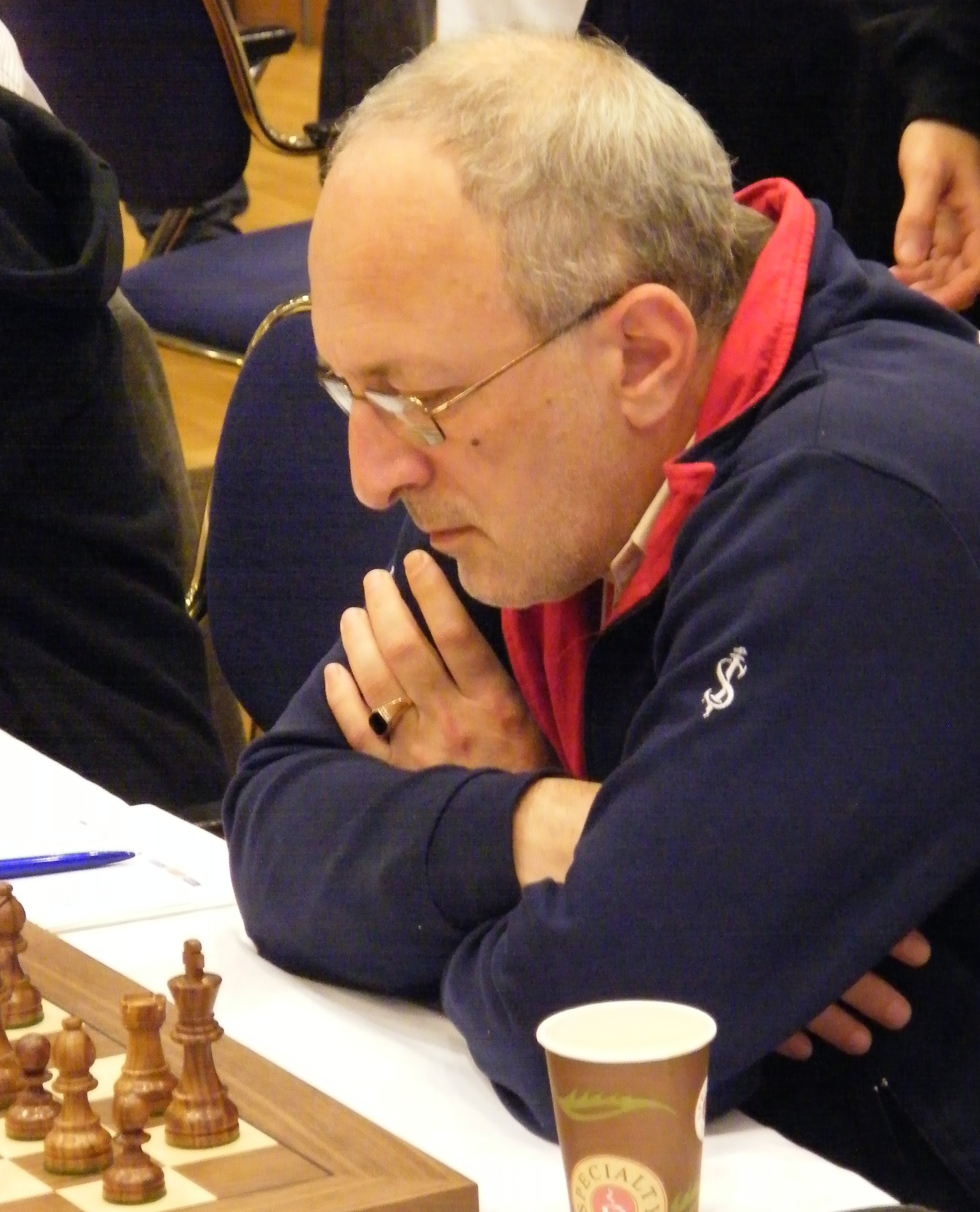 Michail Gurewitsch bei der 38. Schacholympiade in Dresden 2008